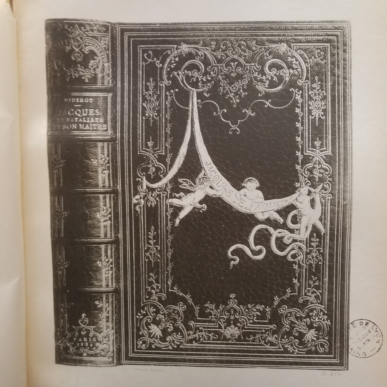 Jacques le Fataliste, par Diderot. Paris, Société des Amis des Livres, In-4° Marocain grenat foncé. Grande composition formant encadrement ; filets et petits fers dorés, menus rinceaux mosaïquées de maroquin aux teintes multicolores nuancées ; guirlandes de petites fleurettes de plusieurs teintes reliées par un filet doré ; feuillages et fleurs mosaïqués ; toute la mosaïque sertie d'or. Banderole maroquin blanc bleuté et Amours mosaïqués sur le premier plat. Dos décoré et mosaïqué dans le genre des plats. - Doublures et gardes de soie. - 1890. M. Lucas, à Paris.